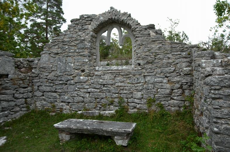 Ardre 35:1. Kyrkoruin. Ardre 35:1